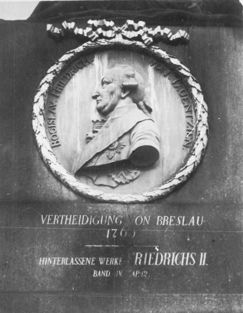 Flachrelief am ehemaligen Tauentziendenkmal in Breslau